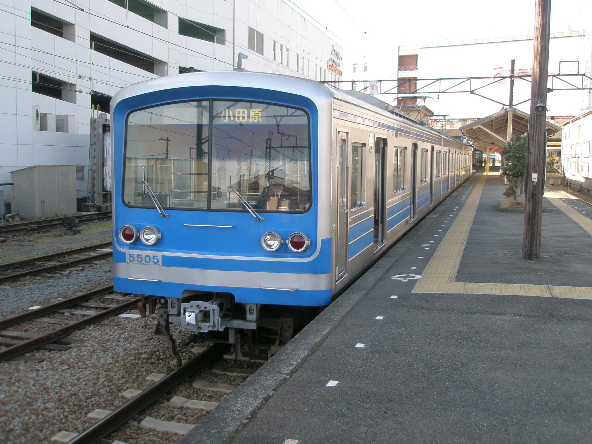 伊豆箱根鉄道大雄山駅ホームにて。